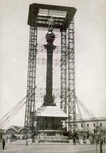 Obras del Monumento a Colón (Barcelona).